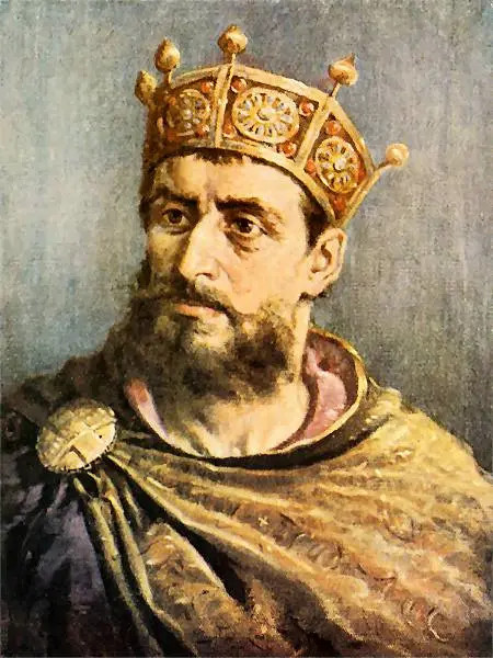 Mieszko II